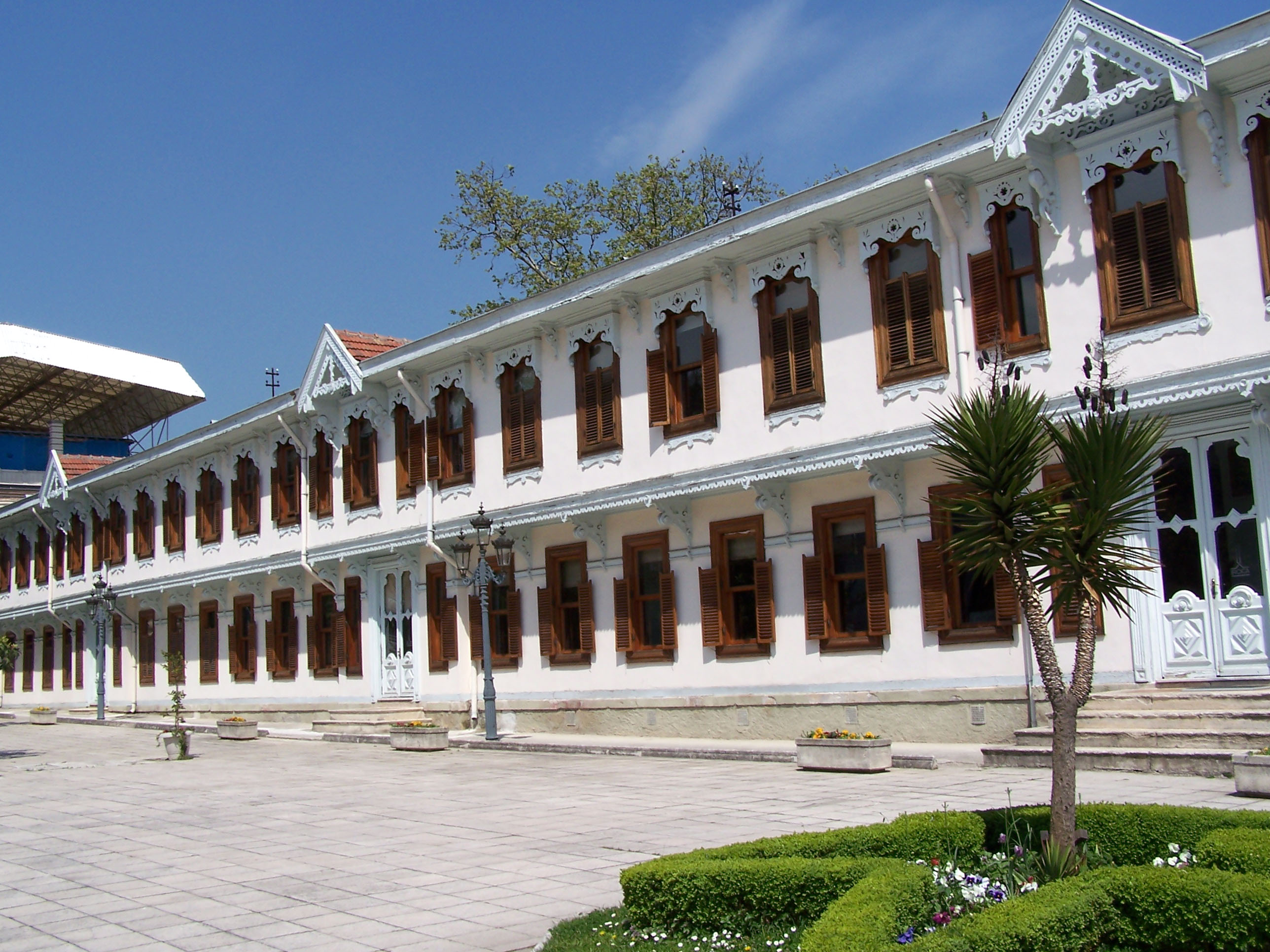 Yıldız Sarayı in Beşiktaş, İstanbul, Turkey